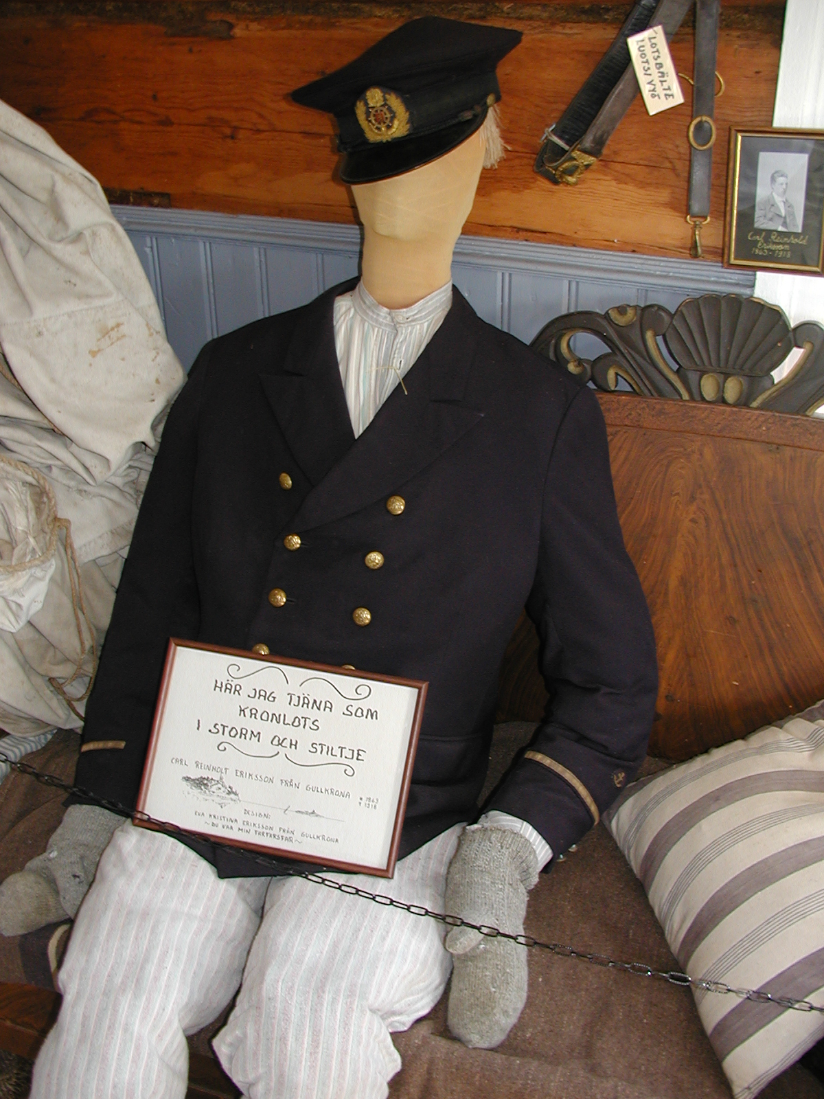 Gullkrona lotsmuseum. Foto: Kristian Bäckström 2005.